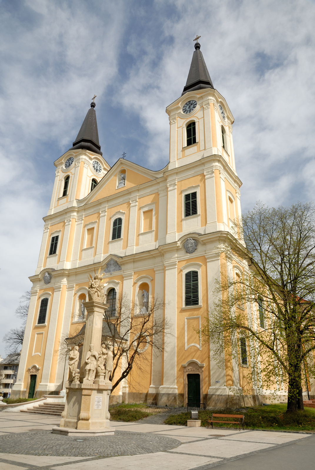 R. k. plébániatemplom (Zalaegerszeg, Szabadság tér)